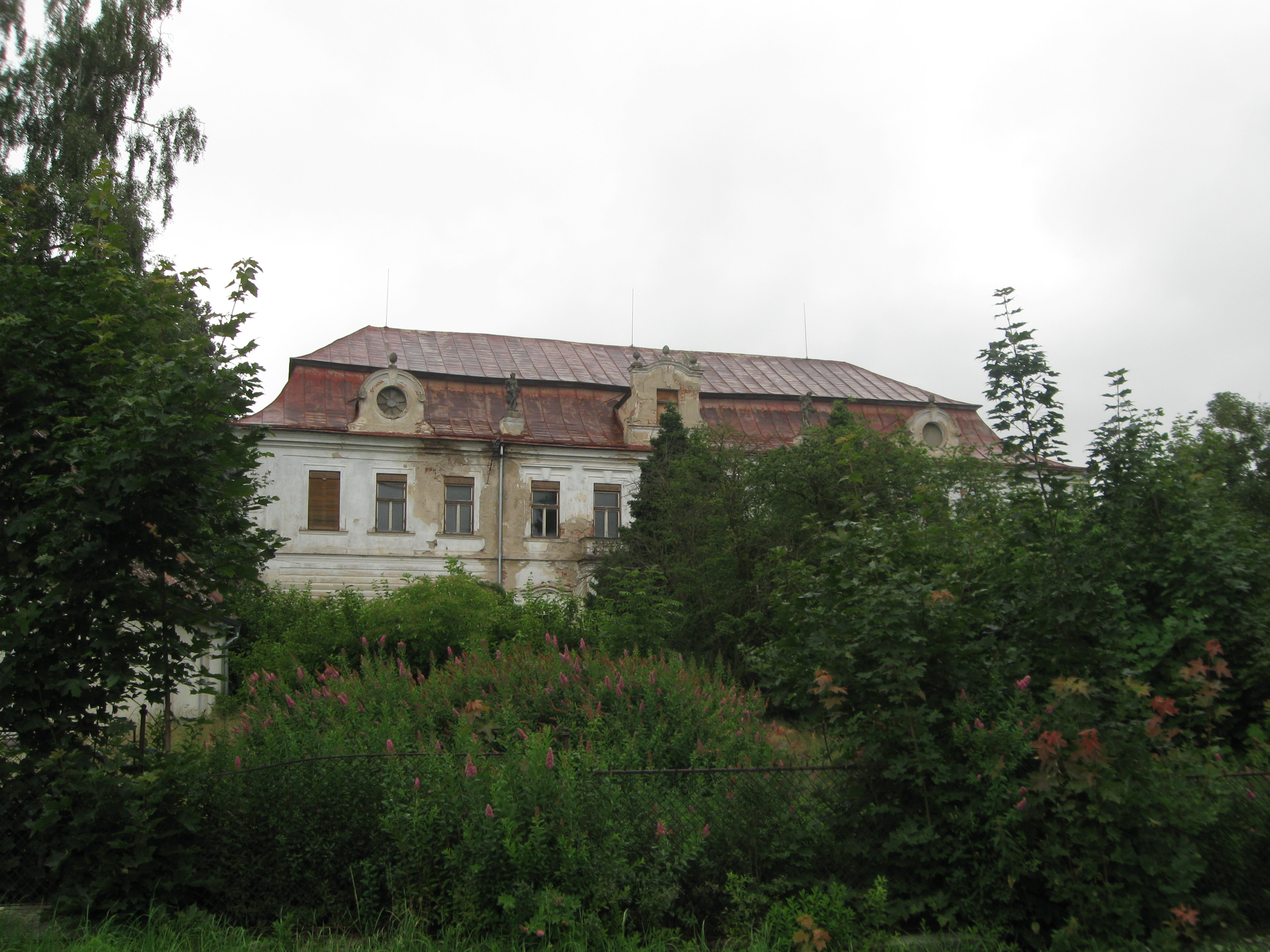 Košetice, starý zámek